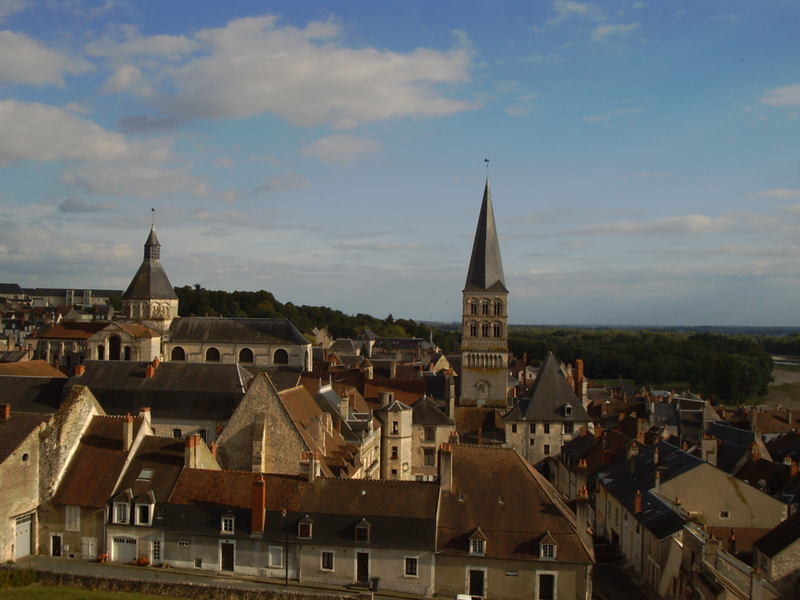 Charité sur Loire